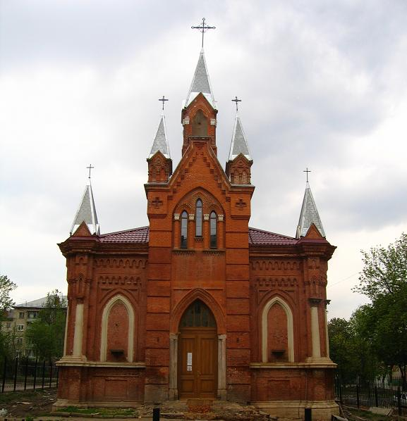 Храм Святых Апостолов Петра и Павла в Туле